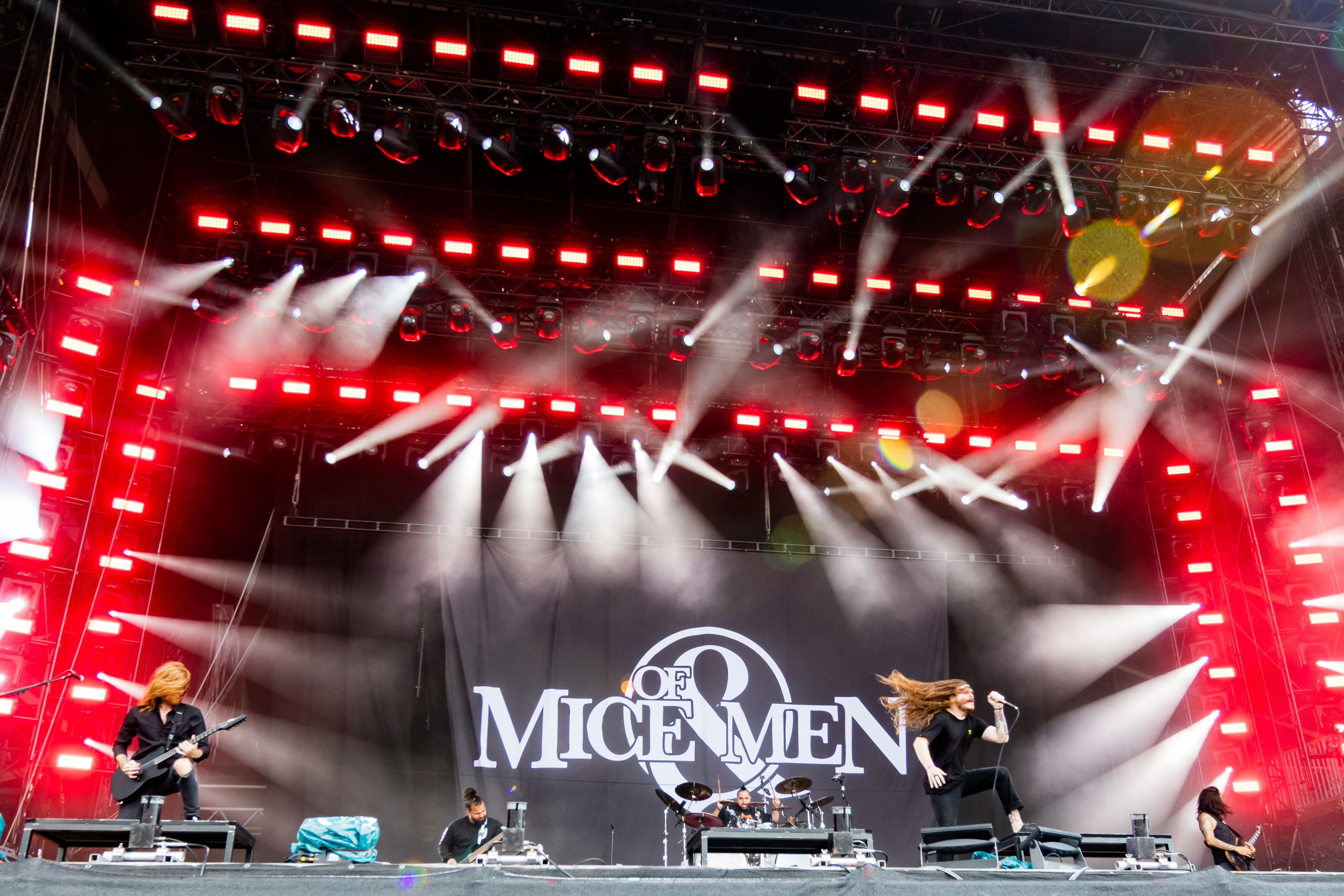 Of Mice & Men during Wacken Open Air at The Holy Wacken Land, Wacken, Schleswig-Holstein, Germany on 2019-08-03, Photo: Sven Mandel